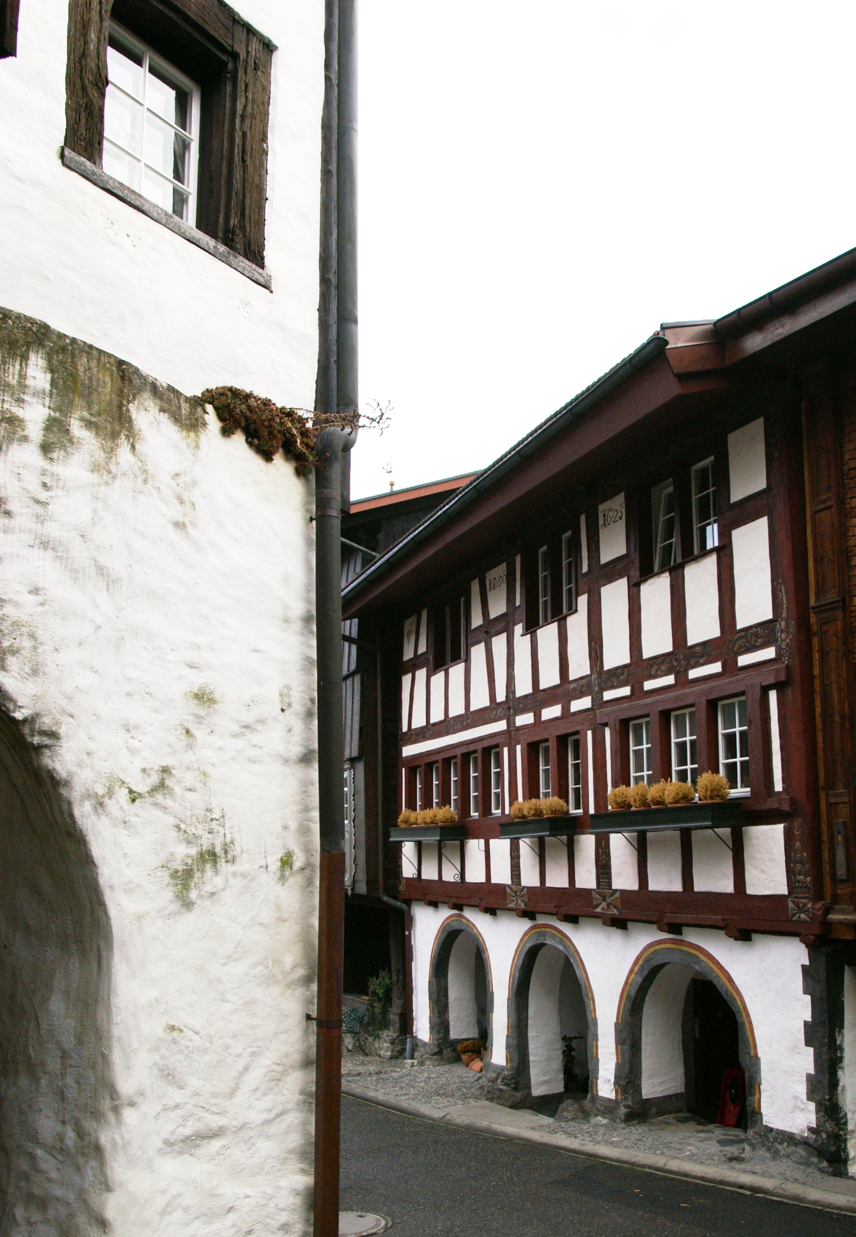 Schloss und Burgstädtchen Werdenberg im Schweizer Rheintal in Grabs.